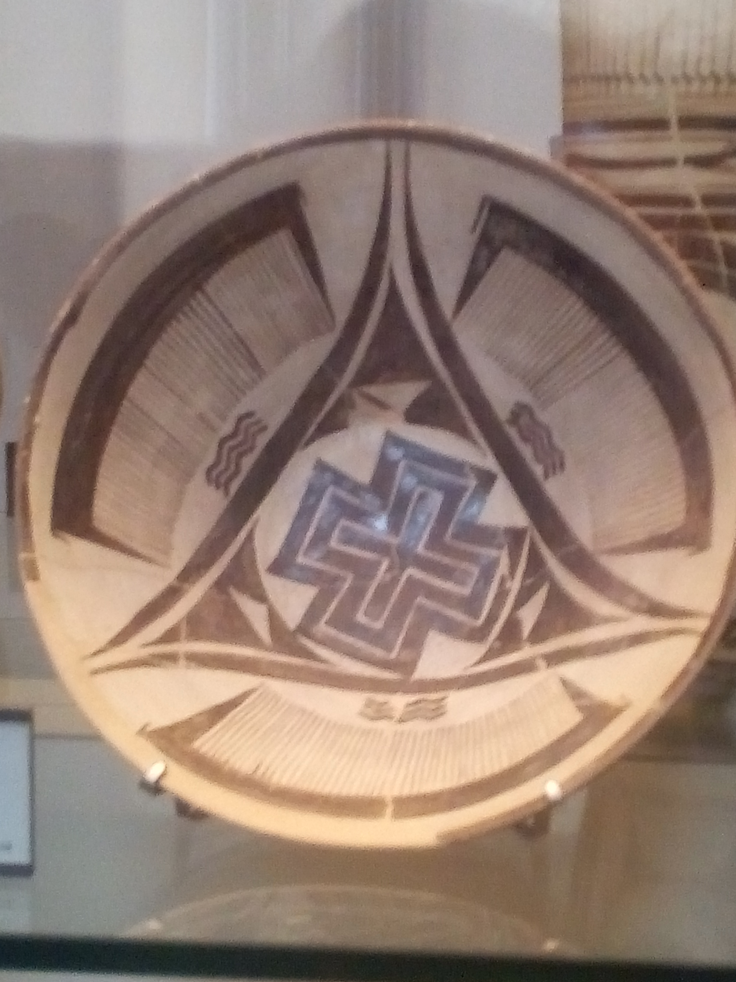 Photo prise au Musée du Louvre: vase de la civilisation élamite (aujourd'hui en Iran), vers 4000 avant Jésus-Christ. Trouvé à Suse.